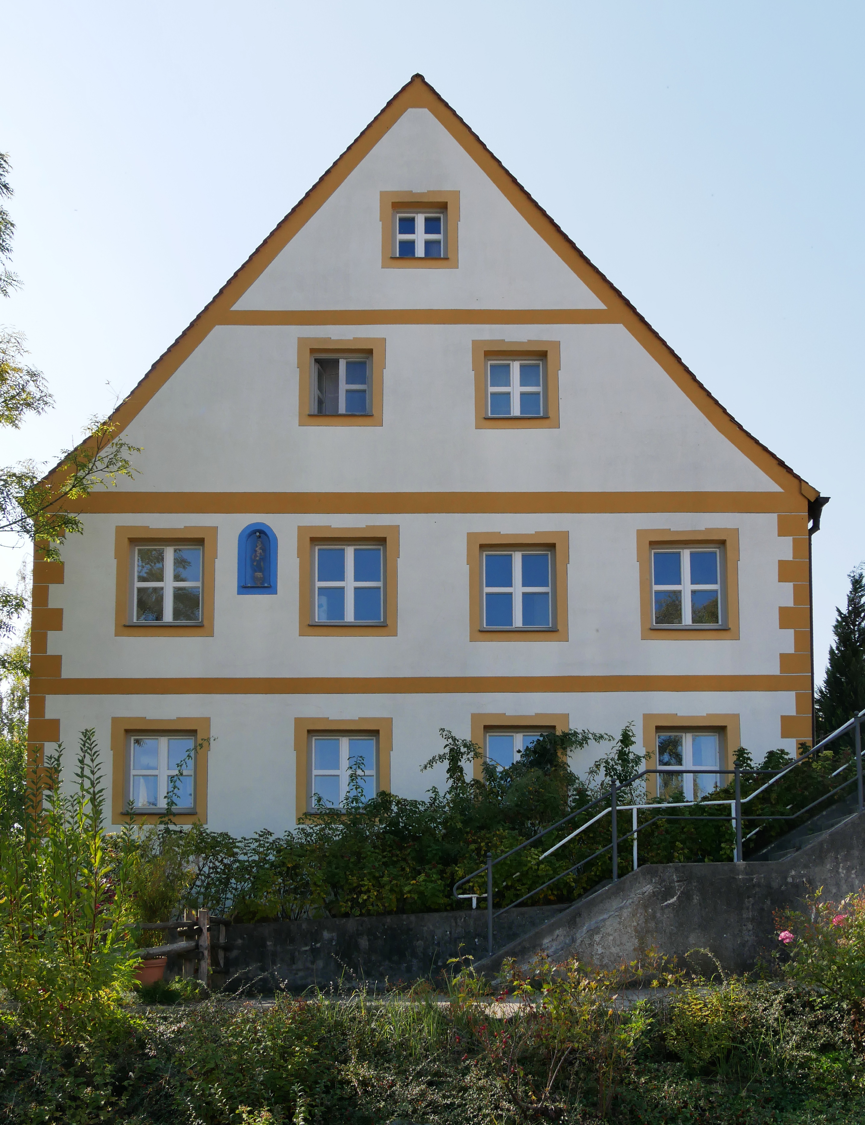 Moorenweis, Ortsteil Grunertshofen, Von-Pfetten-Füll-Str. 4: Ehemaliges katholisches Pfarrhaus, Ansicht von ONO